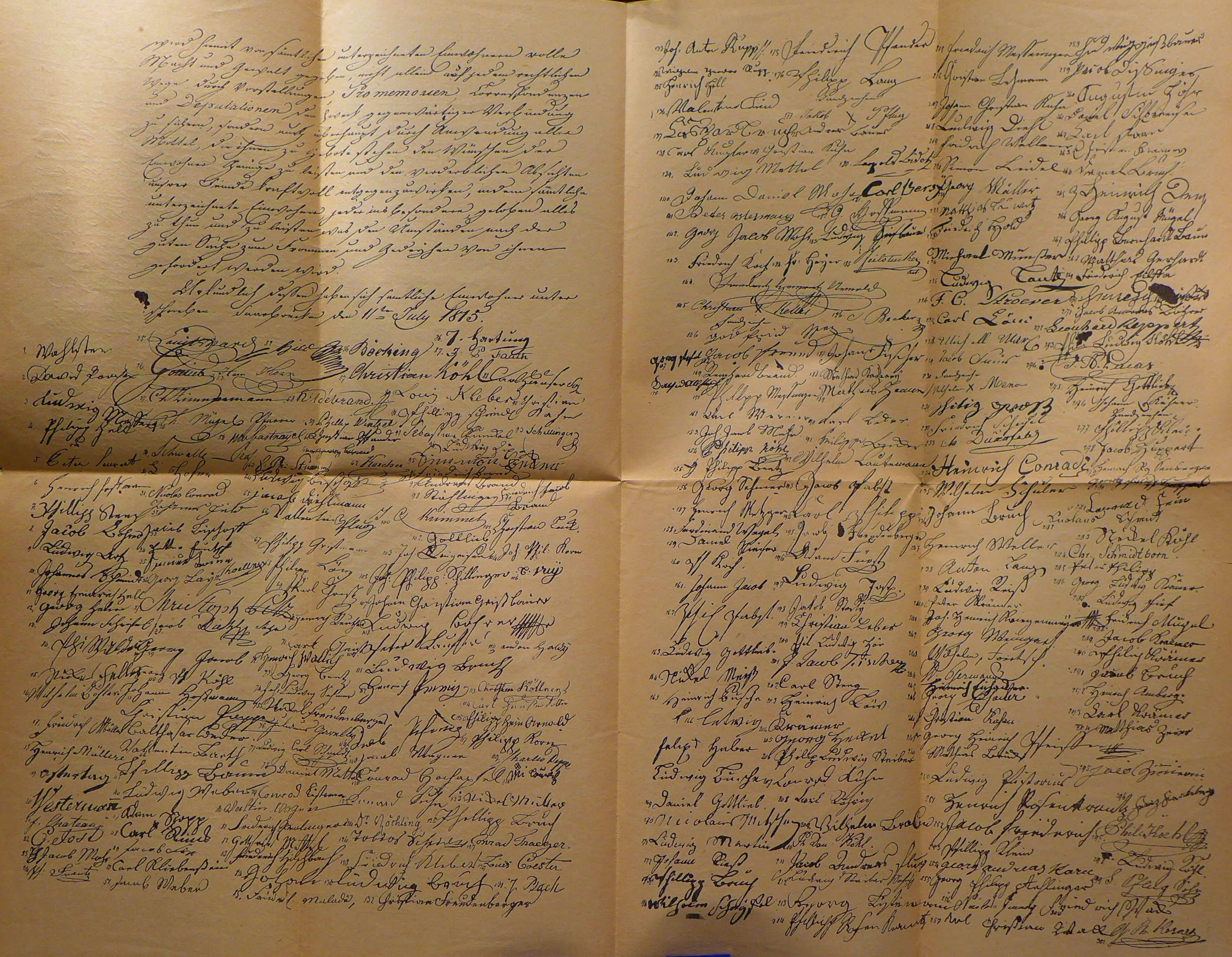 Unterschriftenaktion von Bürgern aus Saarbrücken und St. Johann an der Saar vom 11. Juli 1815 zum Anschluss der Saartalorte an das Königreich Preußen (Innenblatt, Faksimile in natürlicher Größe, Beilage zum Saarkalender 1925)